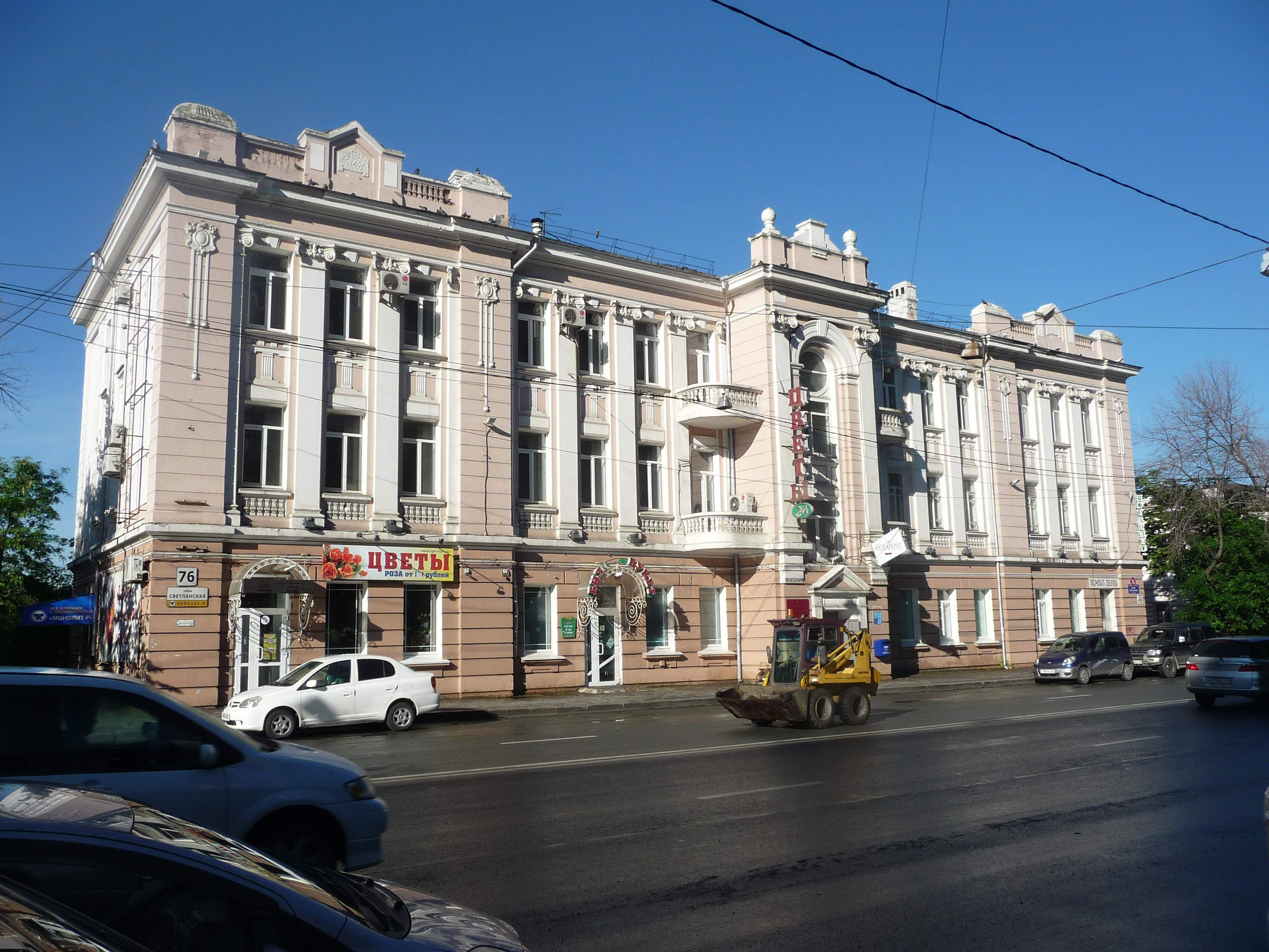 Владивосток, Светланская, 76, 2015-06-30